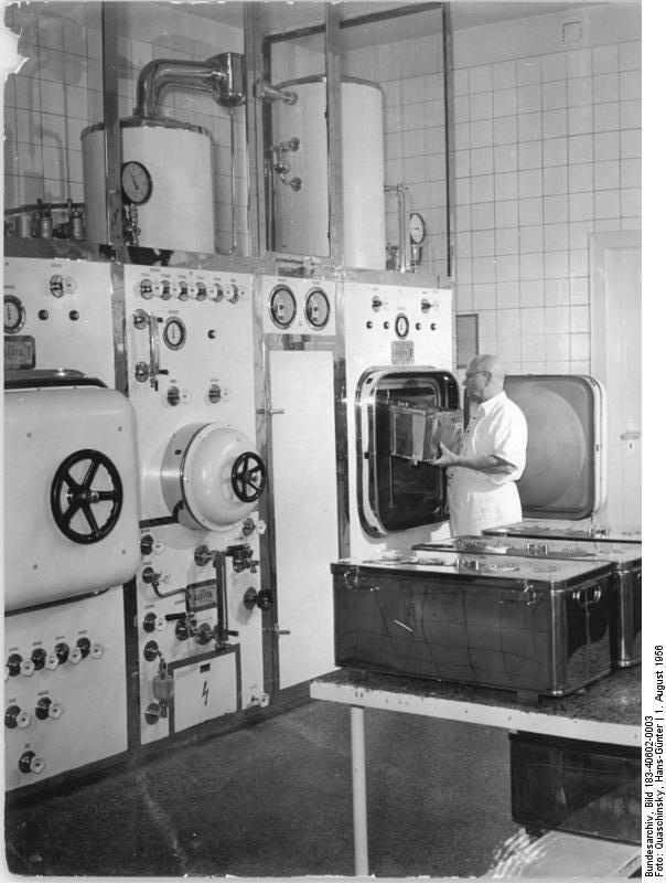 Dresden, Medizinische Akademie, chirurgische Klinik Zentralbild Quasch. 1.8.1956 Chirurgische Klinik der medizinischen Akademie in Dresden. Am 15. Februar 1956 wurde nach einer Bauzeit von zwei Jahren die chirurgische Klinik der medizinischen Akademie in Dresden-Johannstadt eröffnet. Sie ist nach den modernsten Gesichtspunkten erbaut und eingerichtet, trotzdem man sich beim Bau an die vorhandenen Grundrisse eines ausgebombten Gebäudes richten mußte. Sie verdankt ihre allen Erfordernissen entsprechende Gestaltung der lange vorhergehenden Planung (5 - 6 Jahre) und einer systematischen Zusammenarbeit zwischen Architekten und Ärztekollektiv. Die Klinik wurde mit einem Kostenaufwand von ca. sieben Millionen DM errichtet, einschliesslich aller Importe für die Einrichtung. Sie hat eine Kapazität von 325 (drei zwei fünf) Betten und nimmt nur chirurgische Fälle auf. Die Patienten kommen vor allen Dingen aus den Bezirken Dresden und Karl-Marx-Stadt. Spezialfälle kommen aus der gesamten DDR nach Dresden. Spezialgebiete der Klinik sind die Thorax-, Neuro-, Unfall- und Kinderchirurgie. Auf diesen Gebieten wird nicht nur die Heilbehandlung durchgeführt, sondern auch wissenschaftliche Forschung betrieben. UBz: Im Operationstrakt im 5. Stock befindet sich die Groß-Sterilisationsanlage, die größte in der DDR zum Sterilisieren von Wäsche, Verbandsstoffen, Gummihandschuhen und Instrumenten. Der Pfleger Martin Schmiedel, setzt eine der Sterilisations-Trommeln in die Anlage ein.